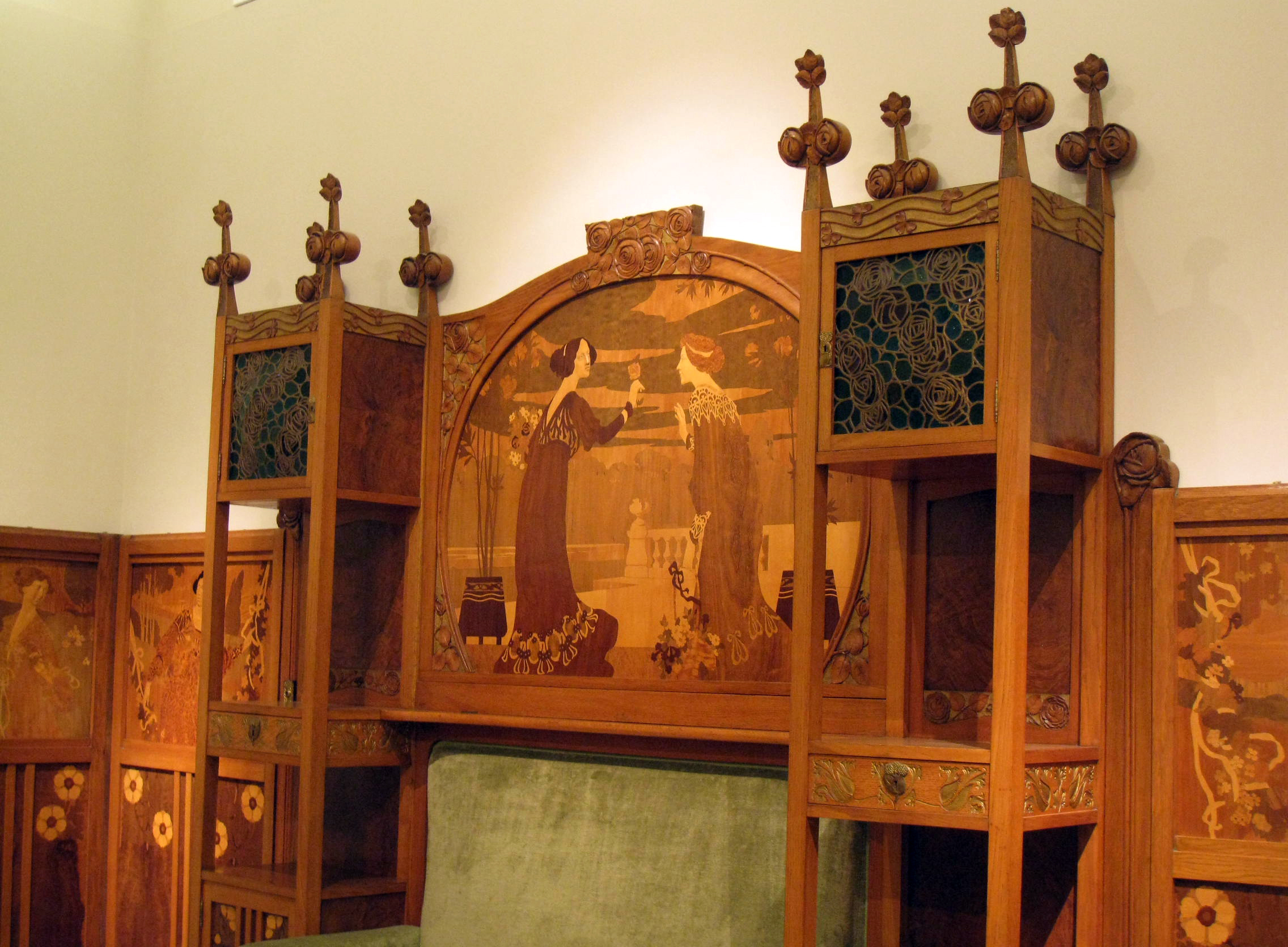 Palau Nacional (Barcelona)